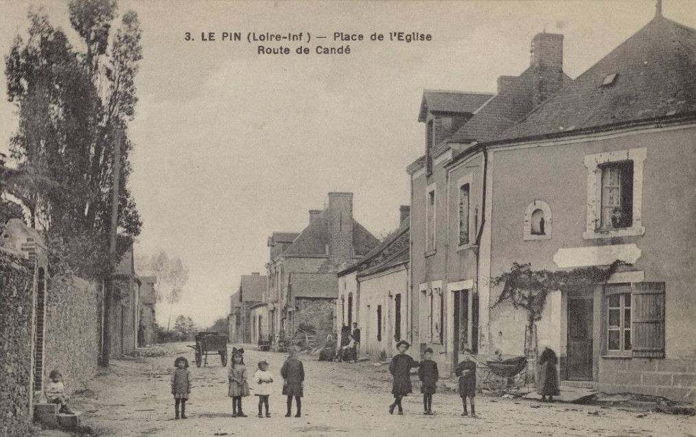 Carte postale illustrant la route de Candé au Pin, Loire-Atlantique, France.